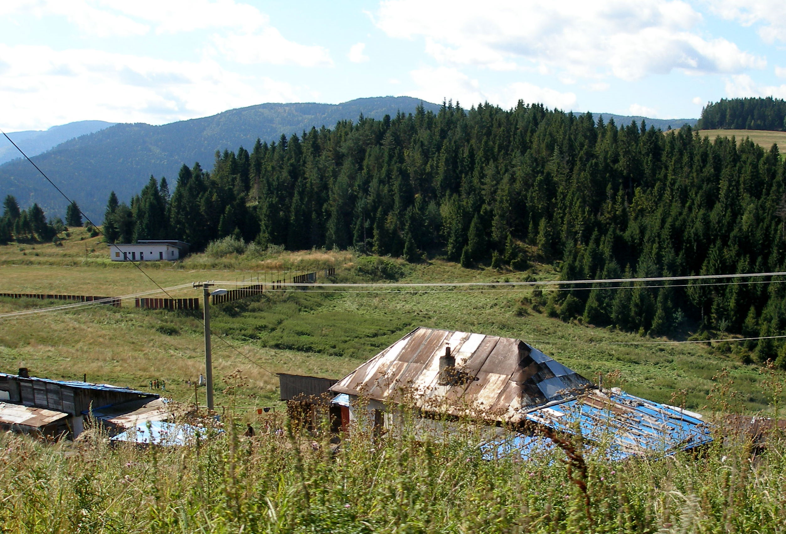 Spišská obec Závadka okres Gelnica